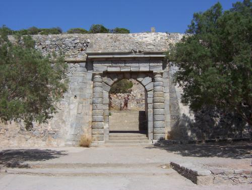 Poort van Spinalonga